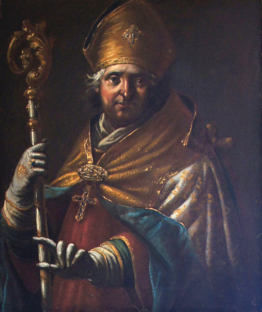 Porträtgemälde von Berthold von Wehingen, Fürstbischof von Freising, im Fürstengang zwischen Fürstbischöflicher Residenz und Freisinger Dom.